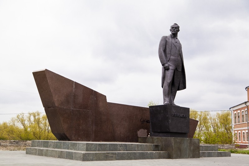 Kurgan.Pro